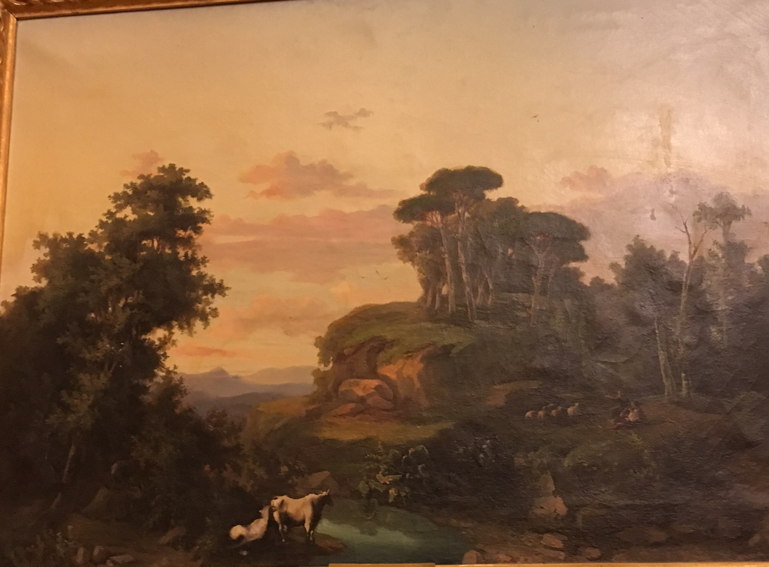 Luisa Silei Paesaggio